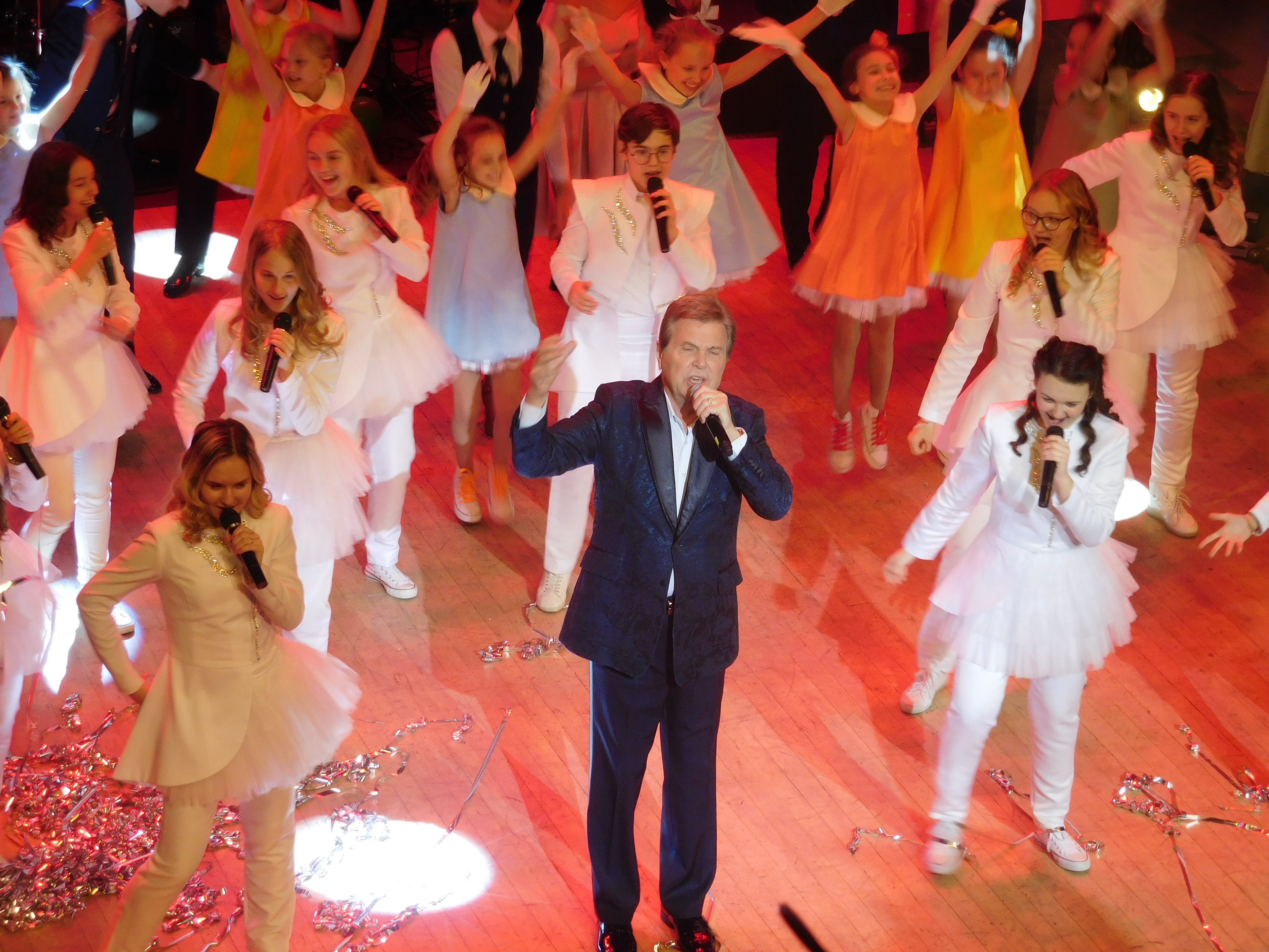 Концерт в день 90-летия ЦДКЖ. Лев Лещенко и детская студия дома культуры